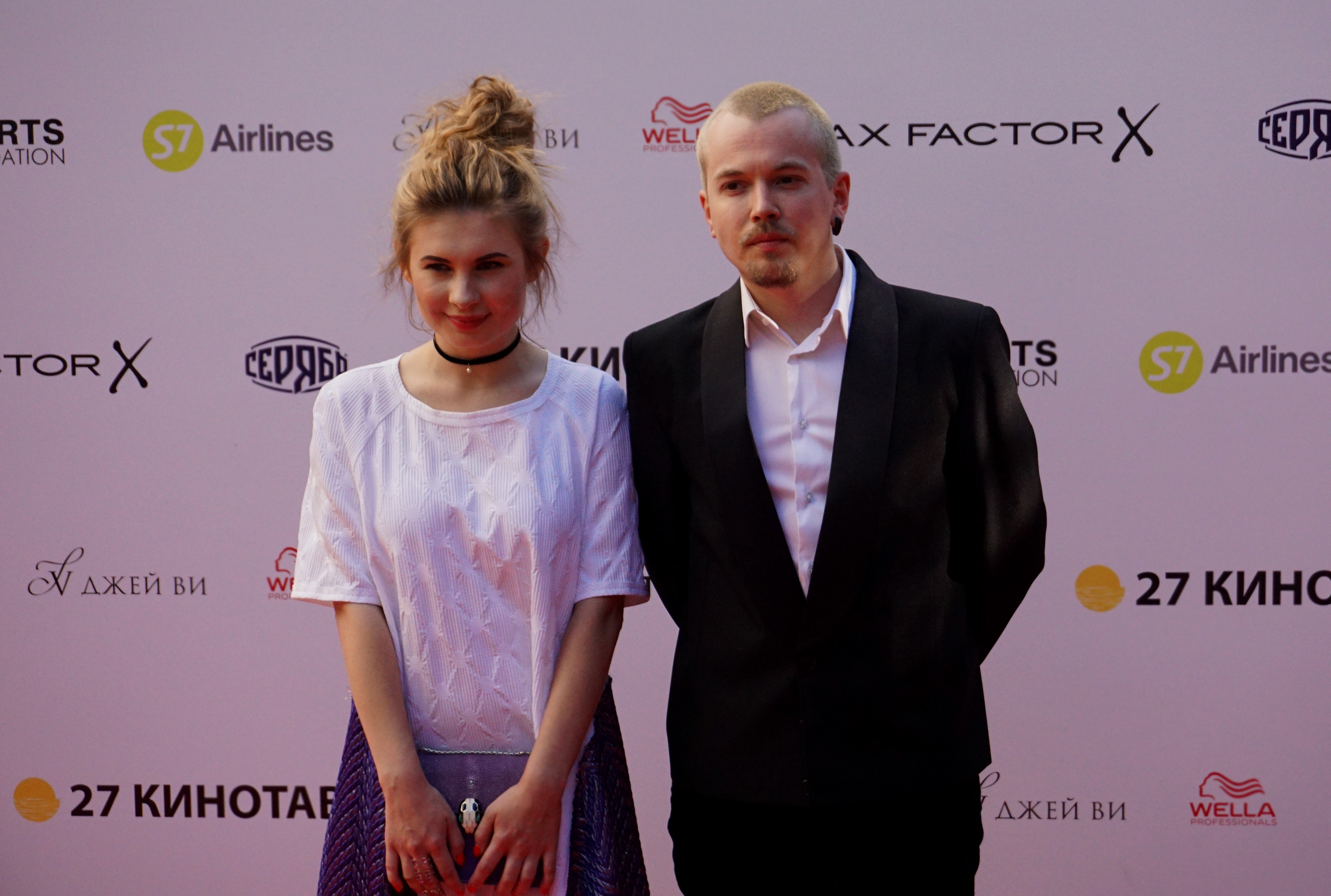 Анна Васильевна Цуканова – российская актриса кино и театра и Иван Макаревич — российский актёр и музыкант.